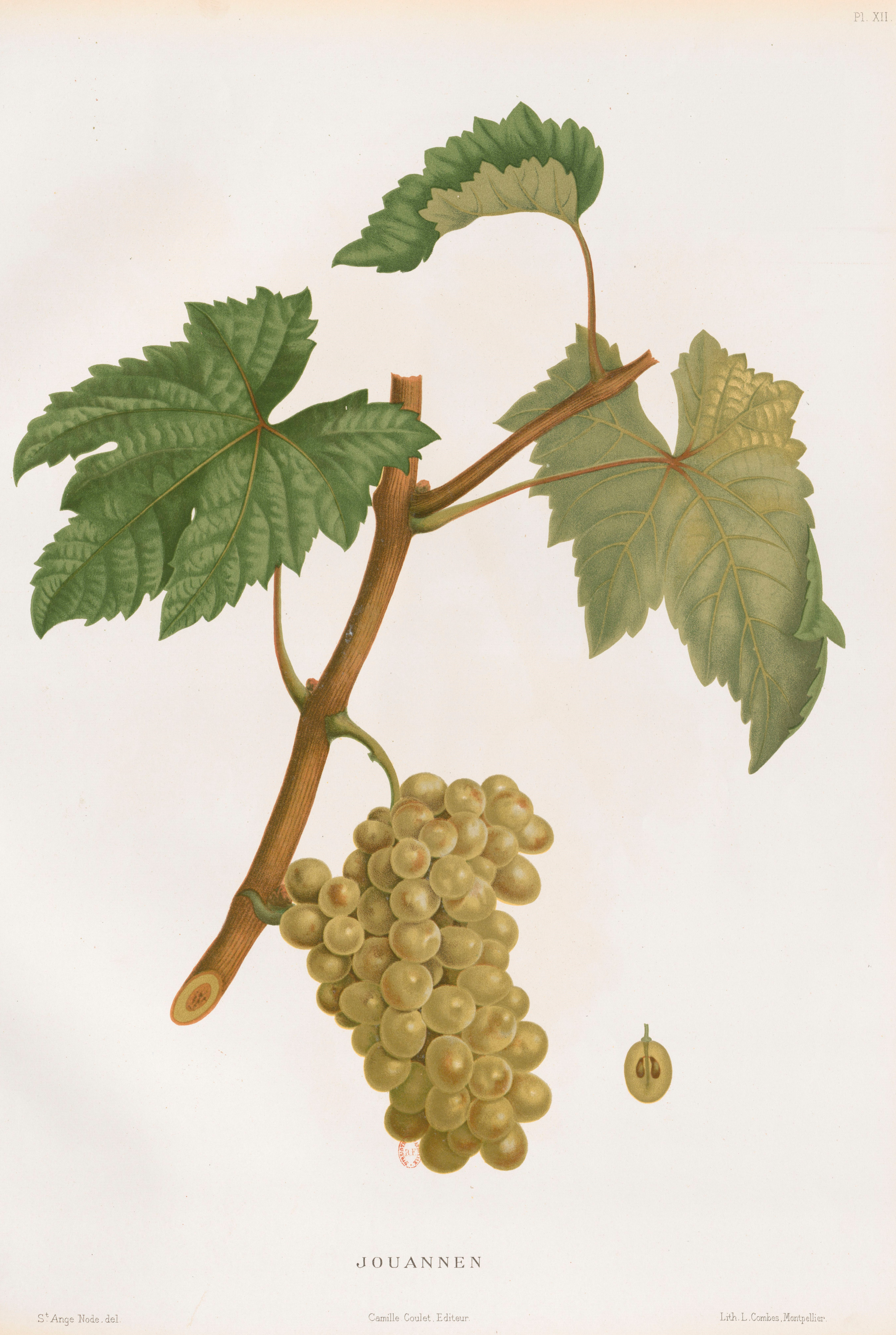 Lithographie du cépage Jouannen